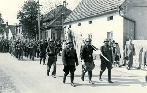 Waltrovka 1945 - po revoluci. Rozvinutí praporu u jinonické Sokolovny. Účastníci generál Kutlvašr (velitel pražského povstání), Plk. Vlček (velitel povstání ve Waltrovce), Plk. Kordač (zástupce plk. Vlčka po jeho zranění pancéřovou pěstí) a další účastníci povstání.